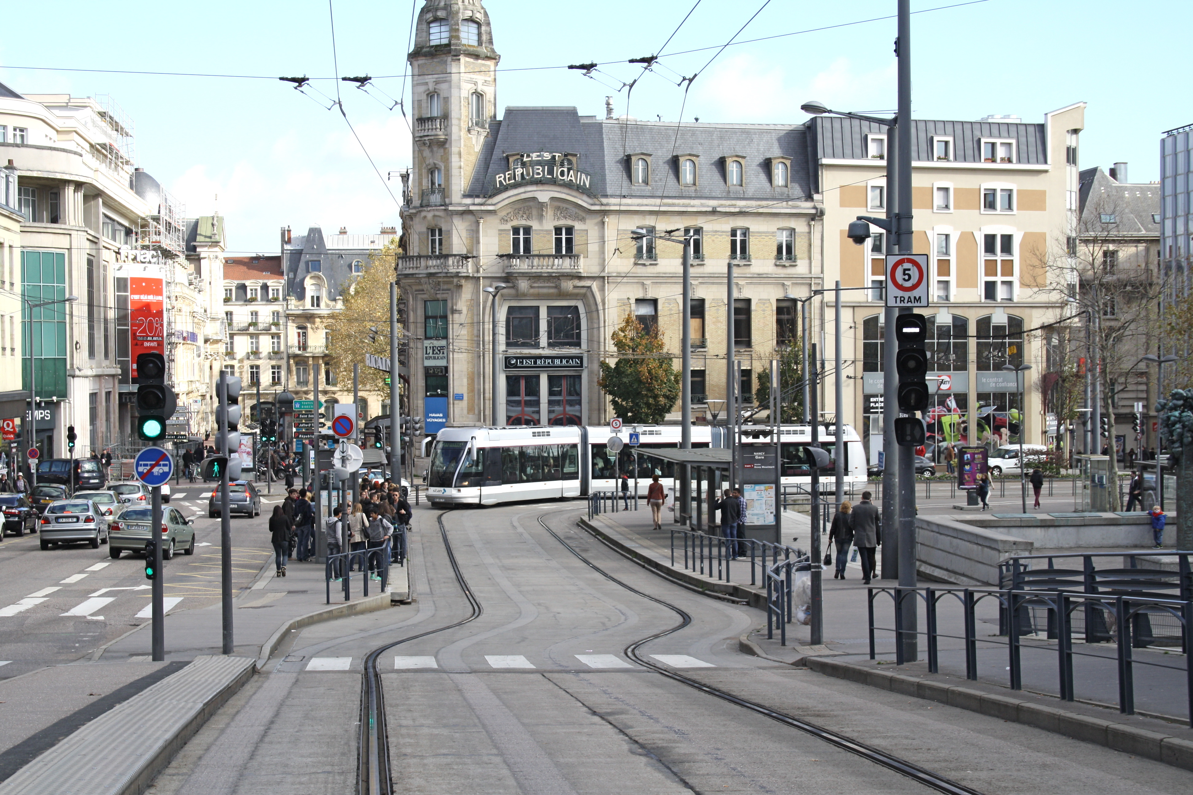 TVR Nancy Gare